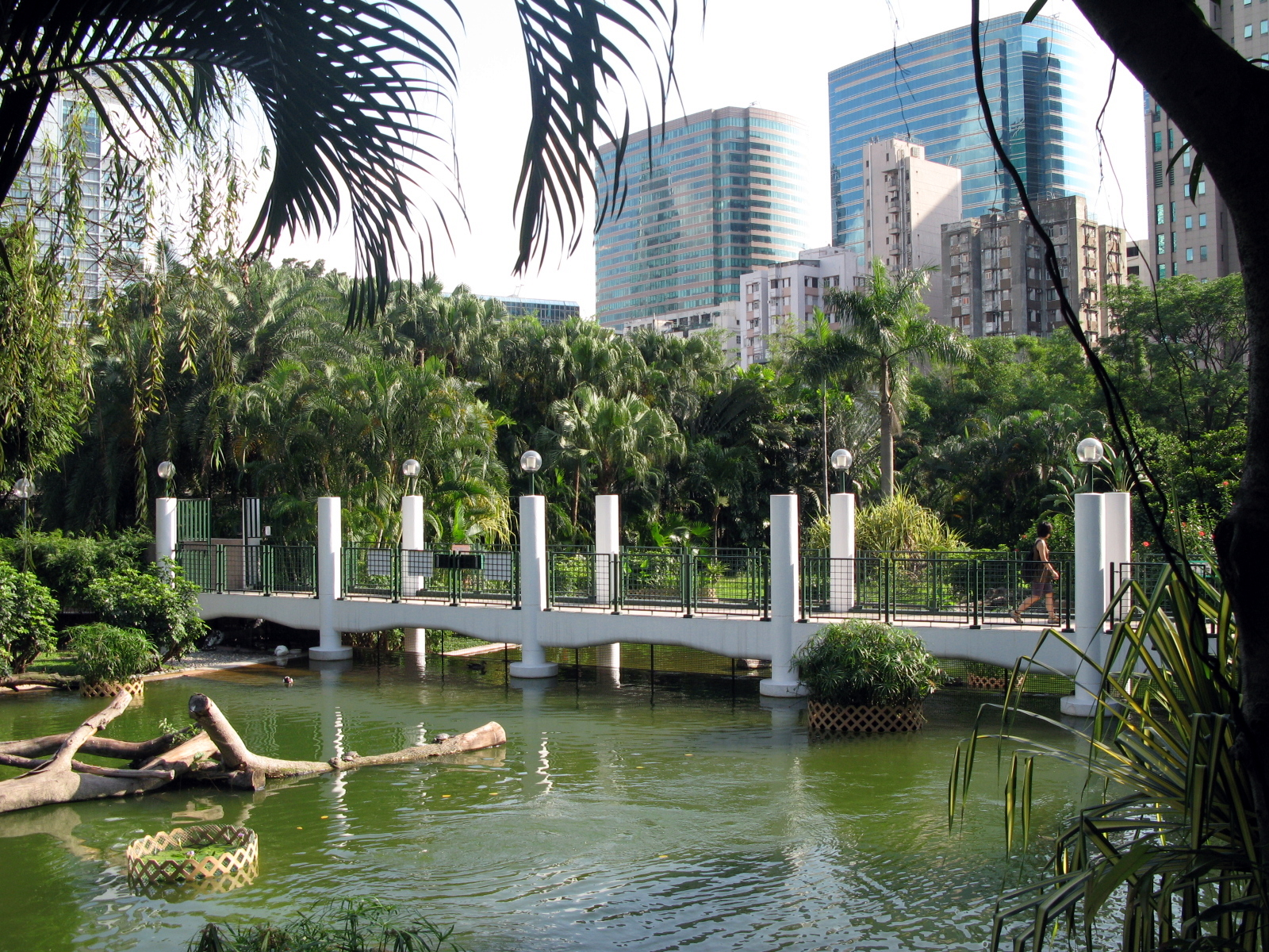 Kowloon Park in Tsim Sha Tsui